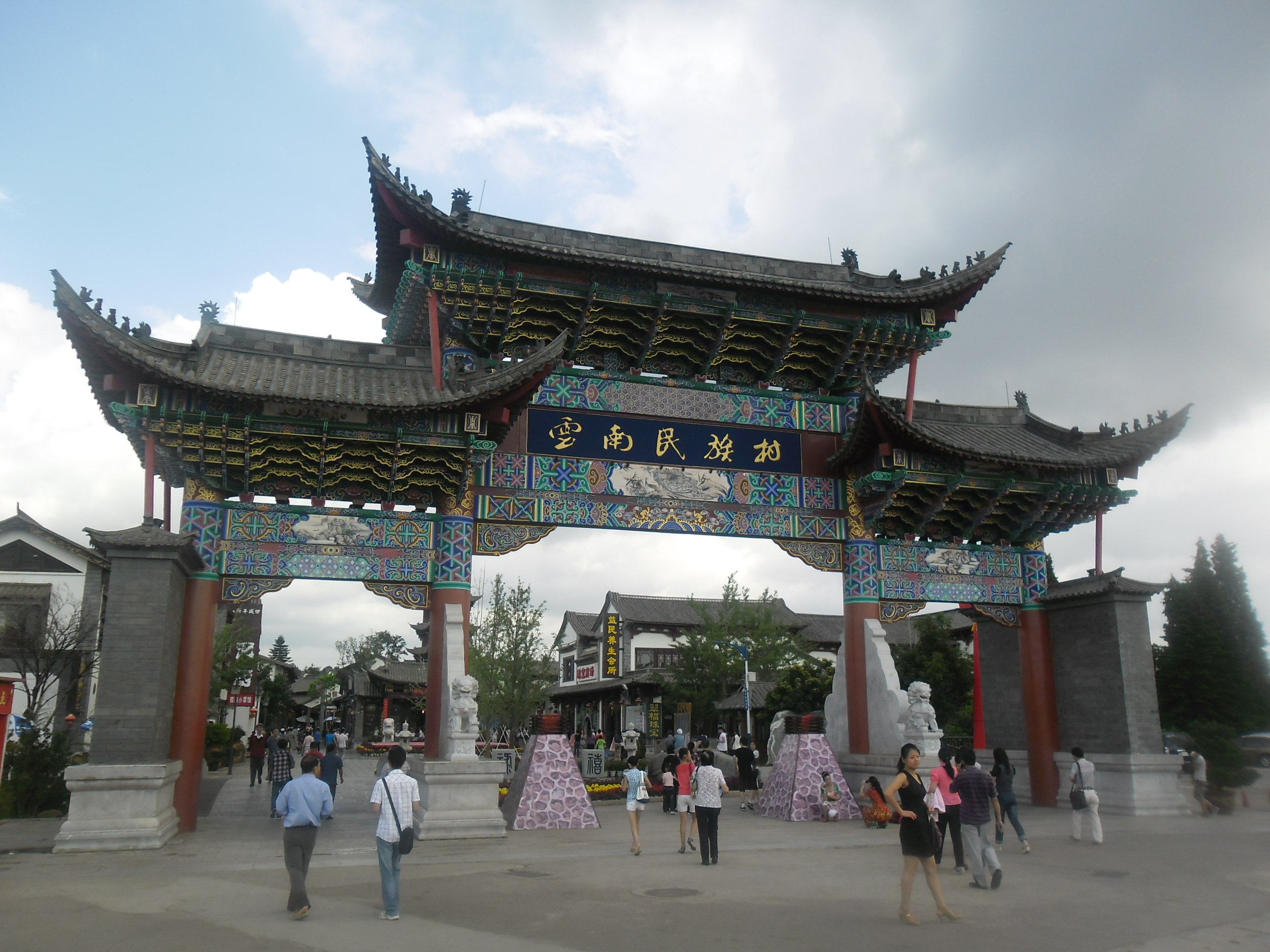 中文（中国大陆）: 云南民族村